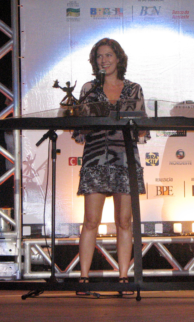 Patrícia Pillar homenageada pelo 11º CINE-PE